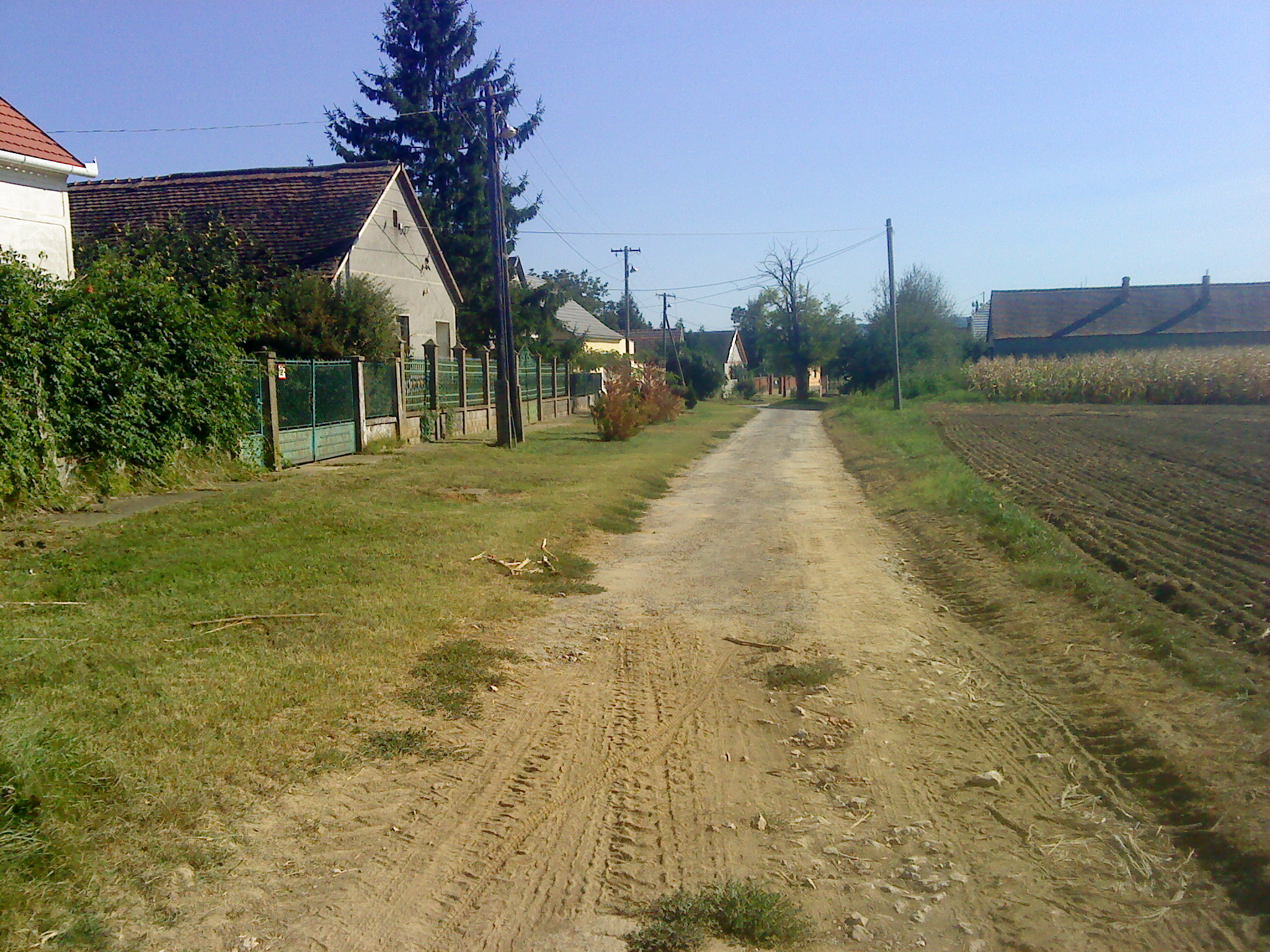 Szalánta-Németi északi része, a Pogányi útról nézve